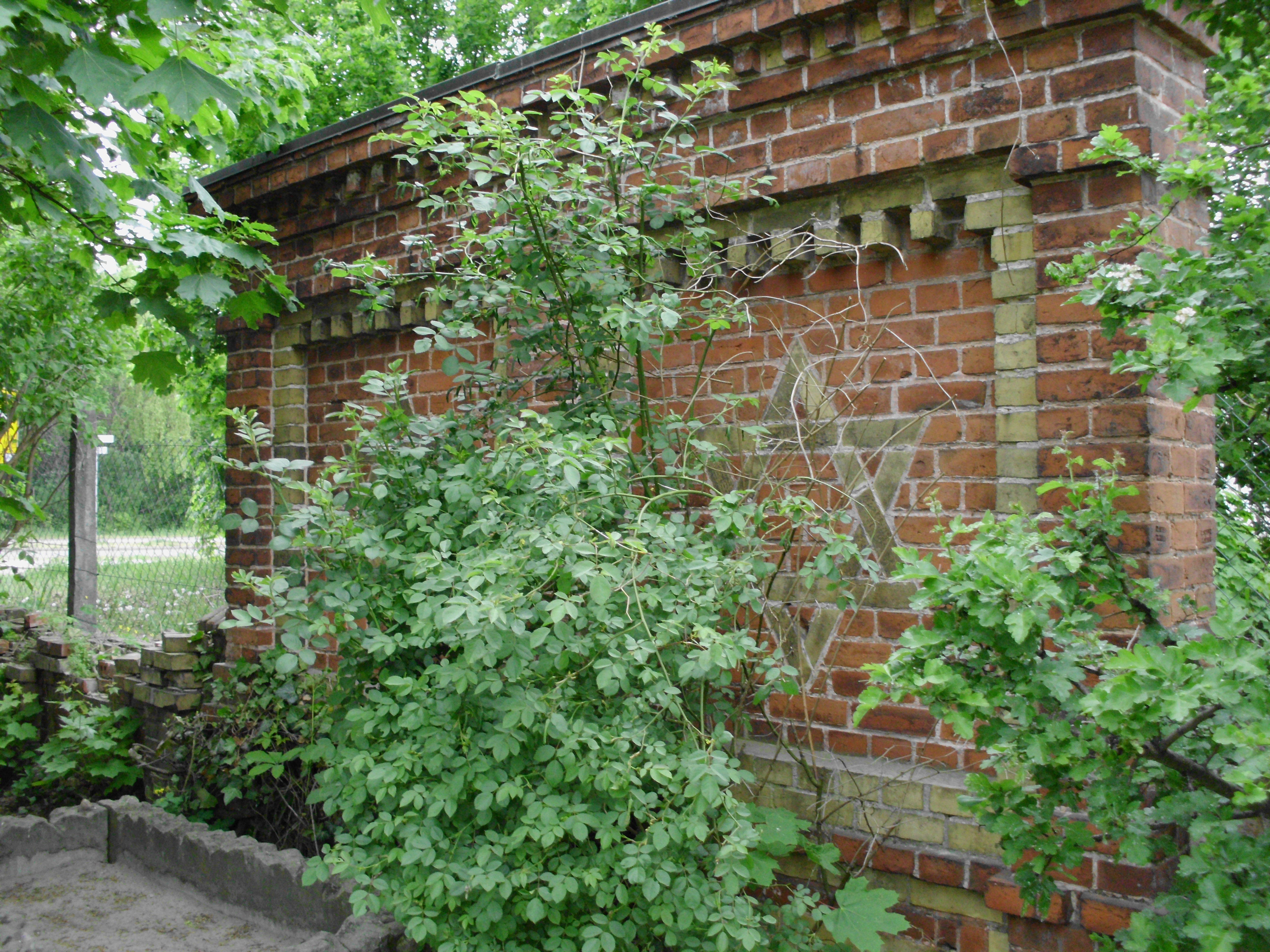 Davidstern-Fries, einzig erhaltenes Mauerstück des Jüdischen Friedhofs in Neuruppin, Brandenburg, Deutschland